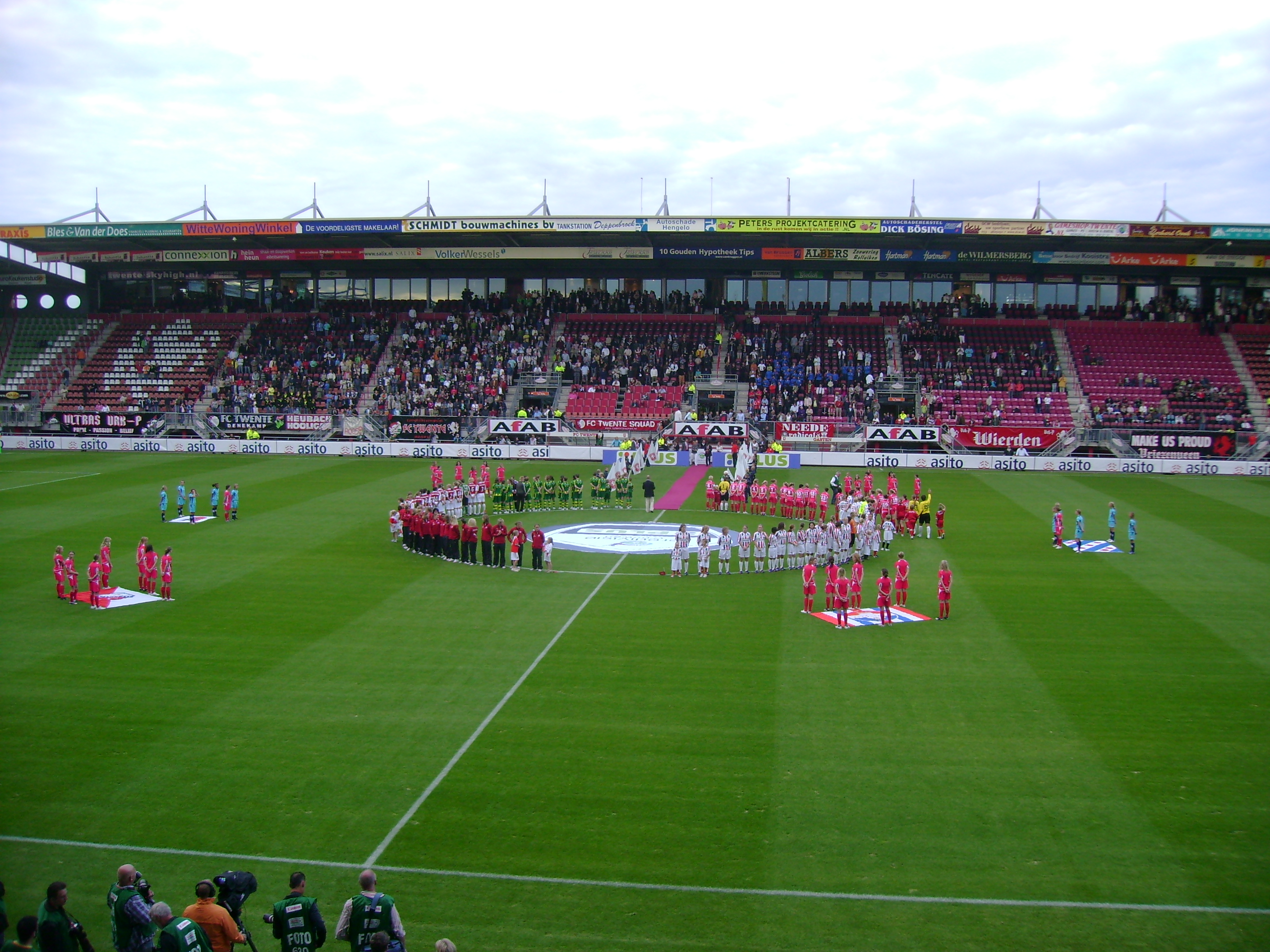 Openingsceremonie van de voetbaleredivisie voor vrouwen in het Arke Stadion in Enschede op 29 augustus 2007, met de presentatie van de zes deelnemende teams.